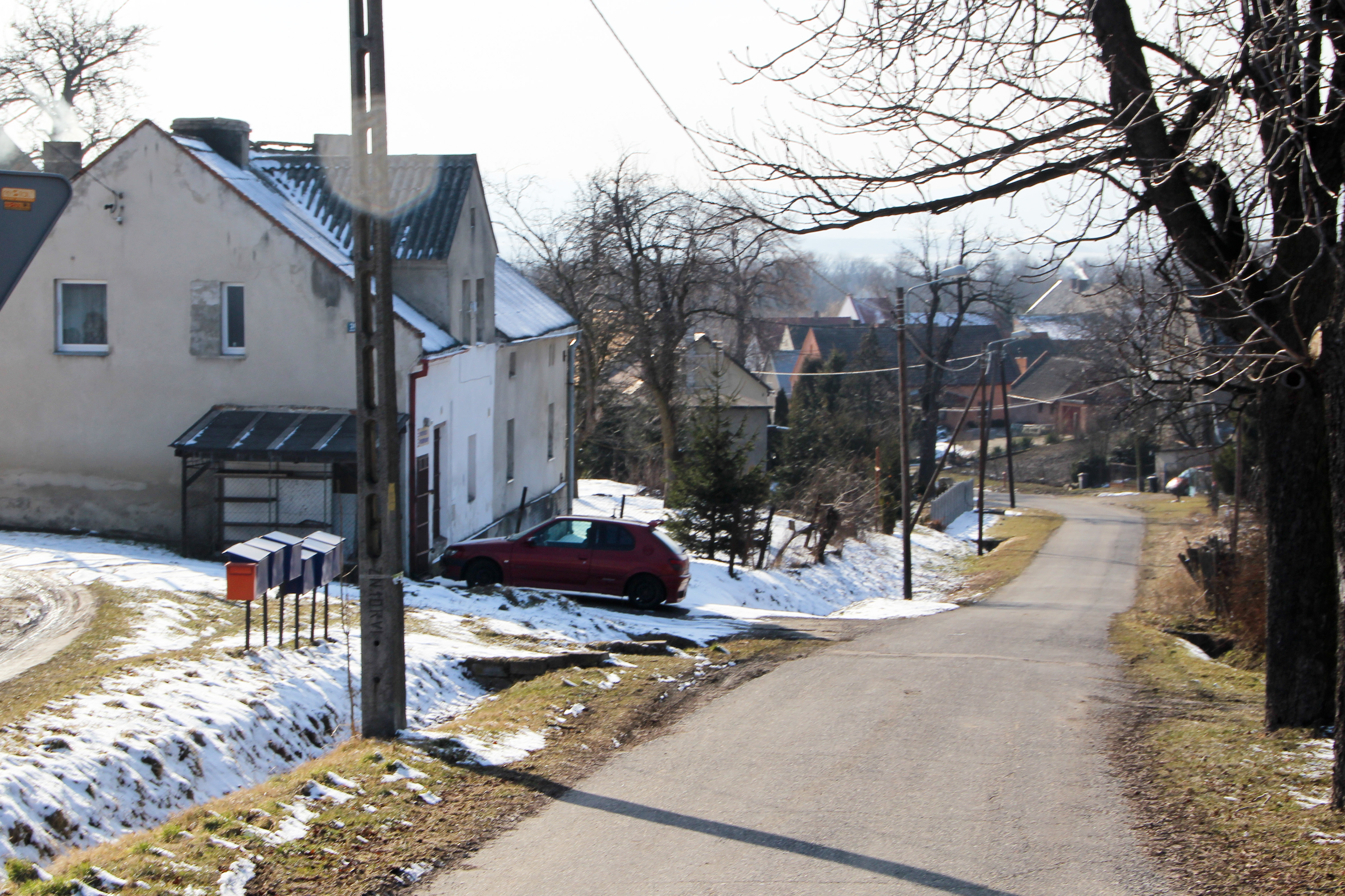 Nadziejów – wieś w Polsce, w województwie opolskim, w powiecie nyskim, w gminie Otmuchów.